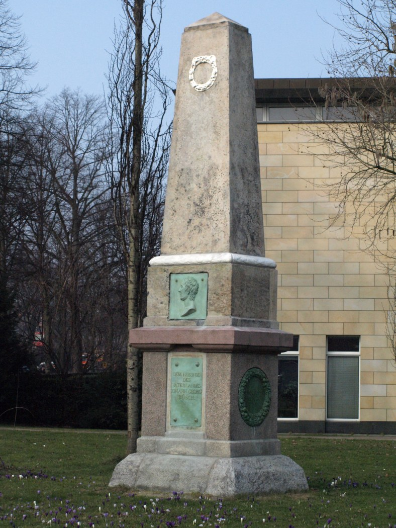 Hamburg, Büsch-Denkmal Gesamtansicht, Foto 2014